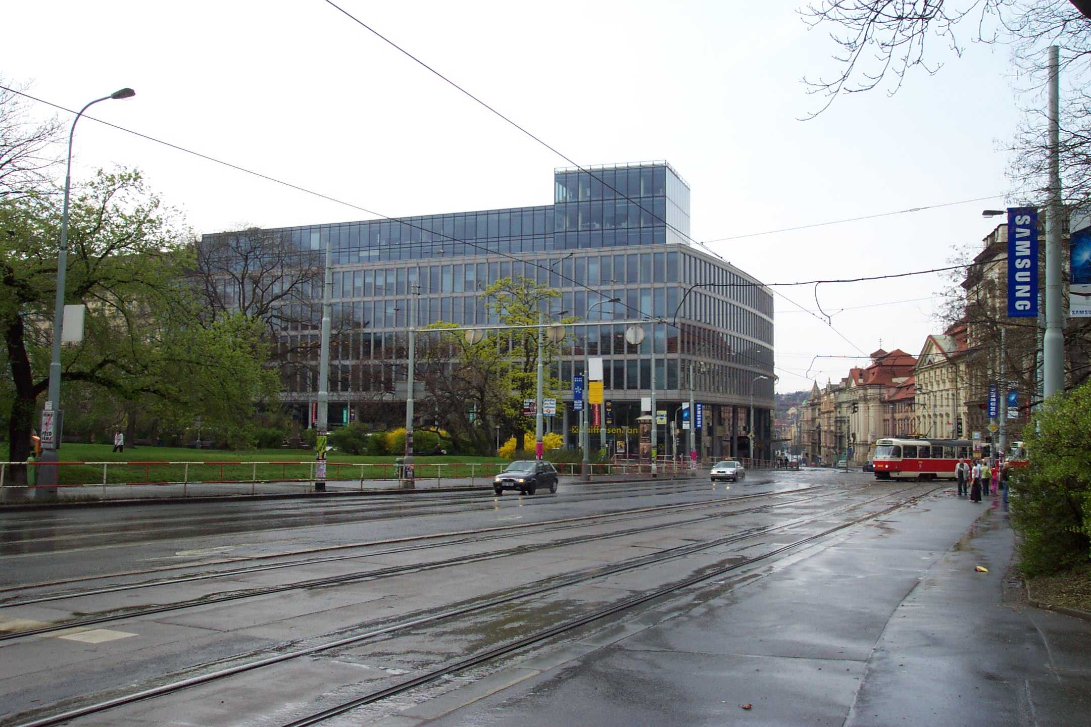 New building in Karlovo náměstí in Prague - Nová budova na Karlově náměstí v Praze